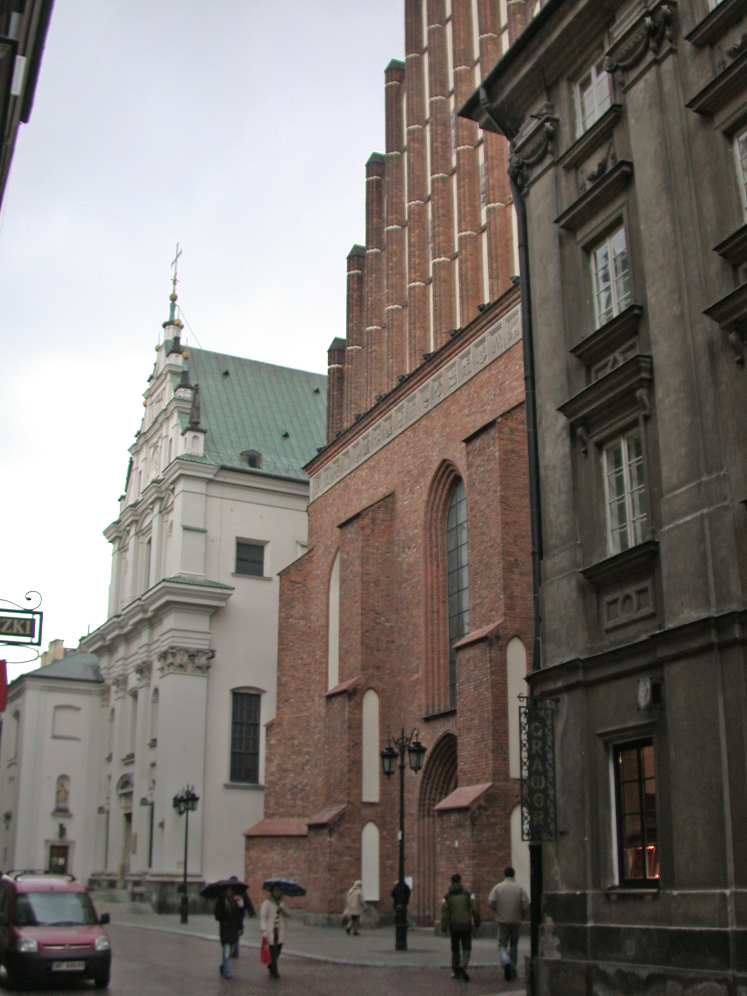 Varsavia, via Świętojańska, con la cattedrale di San Giovanni (Katedra Św.Jana) e la chiesa di di Santa Maria Misericordiosa (Sanktuarium Matki Bozej Łazkawej).